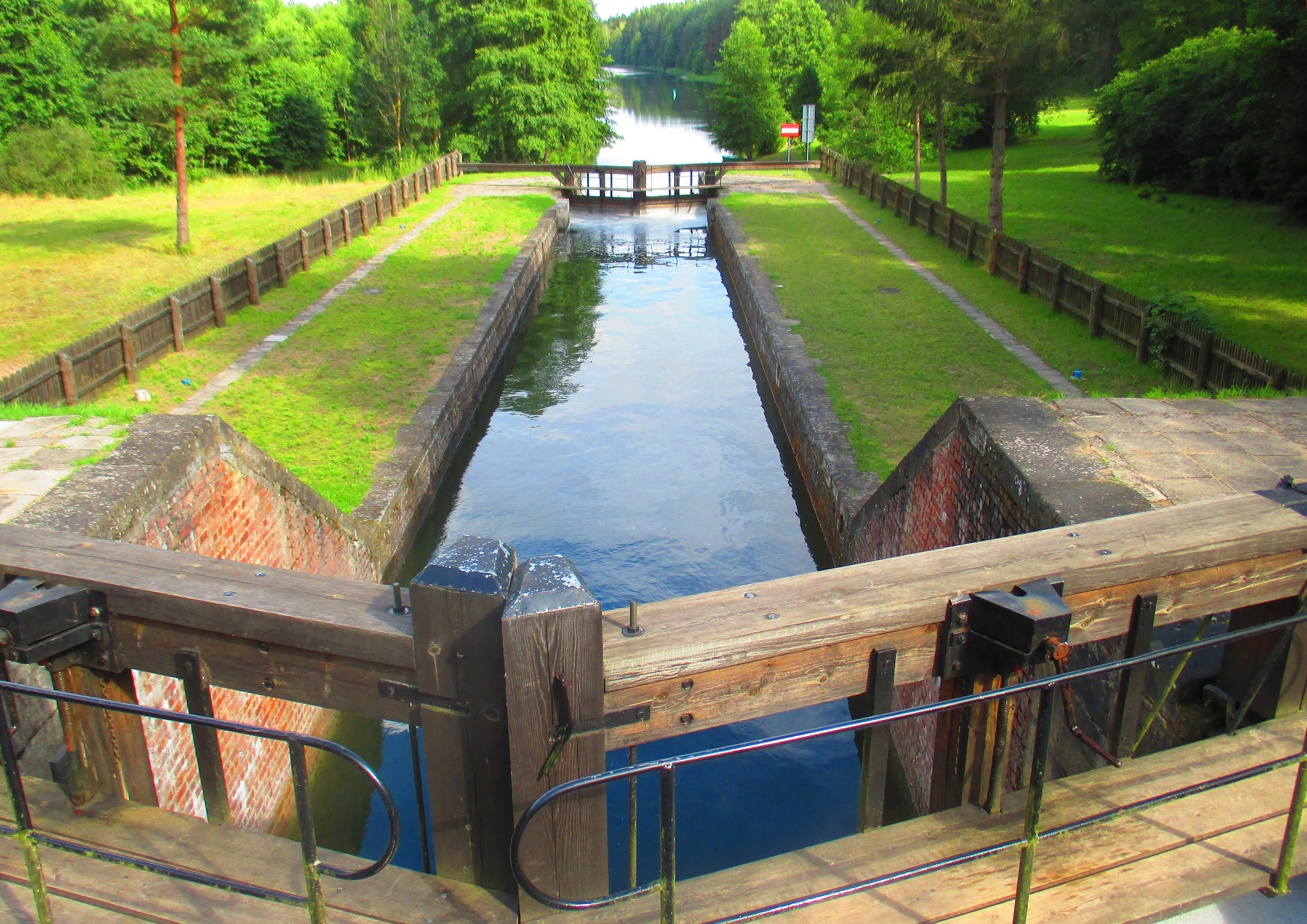 Widok na dolną komorę śluzy Paniewo